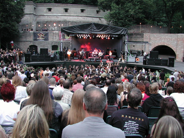 Cumulo Nimbus im August 2004 in Augsburg.